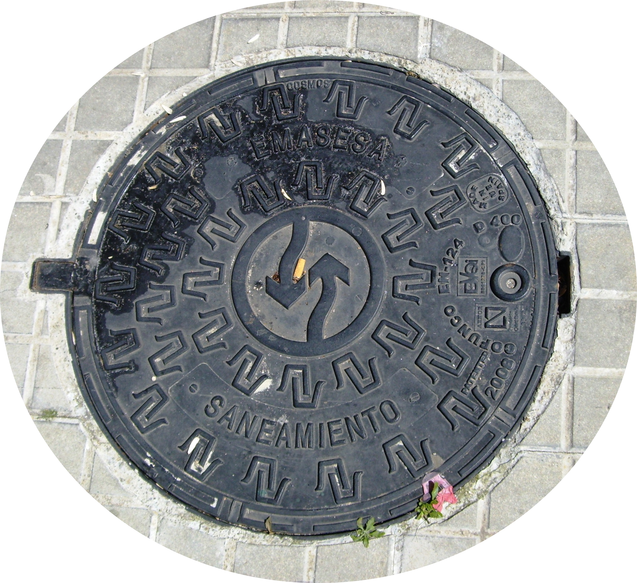 Tapa de alcantarilla de saneamiento de aguas de EMASESA. Foto tomada en el Barrio Alto de San Juan de Aznalfarache